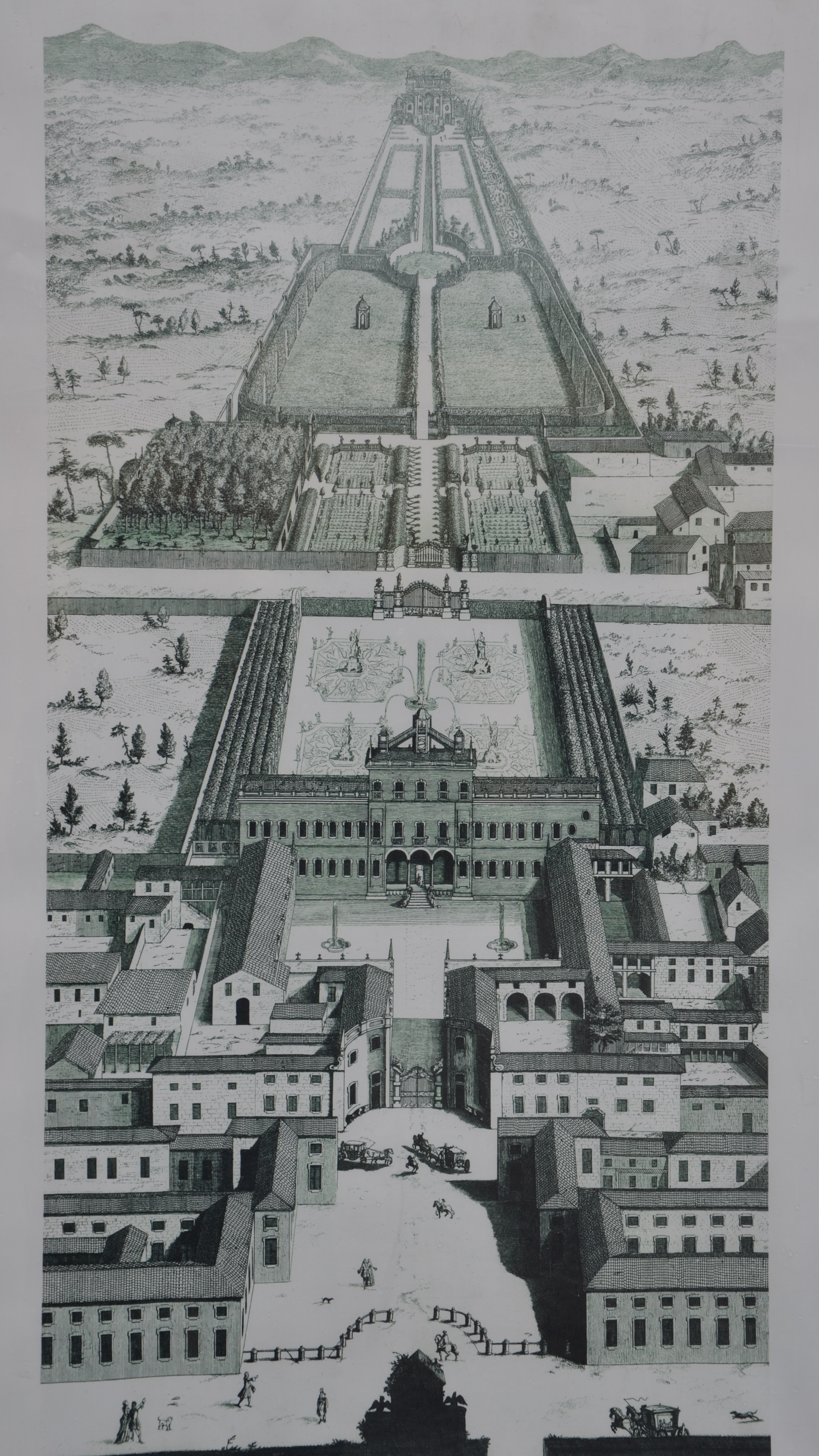 Villa Gallarati Scotti, Oreno di Vimercate (MB) - incisione di Marc'Antonio Dal Re da Ville di delizia o siano palagi camparecci nello Stato di Milano, XVIII secolo